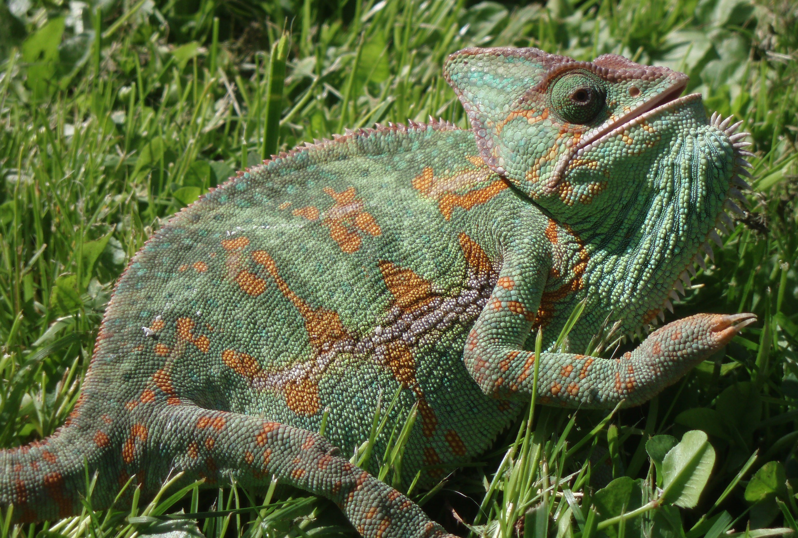 Vlastní fotografie